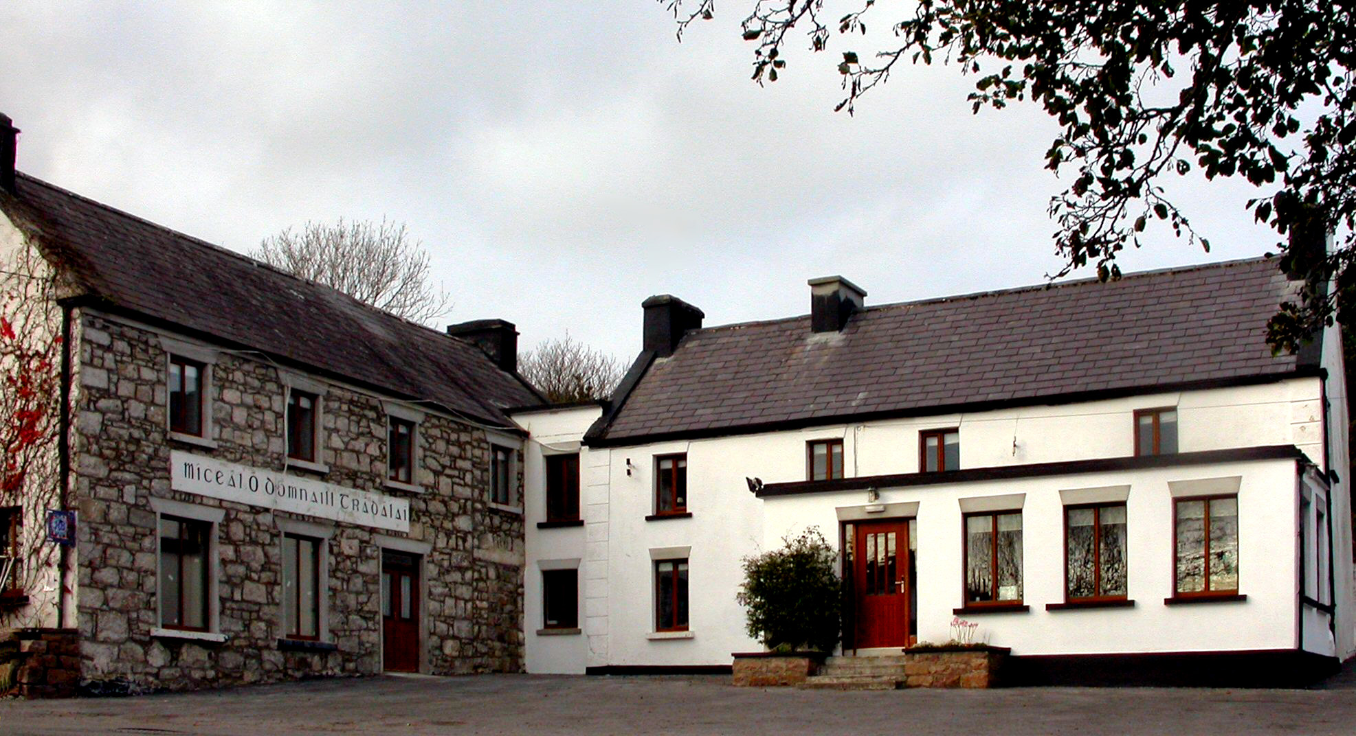 Siopa sa Cheathrú Rua, Co. na Gaillimhe